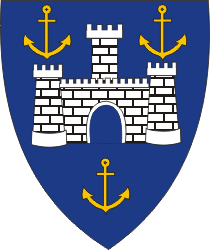 Escut menor de l'illa de Wight, imatge pròpia